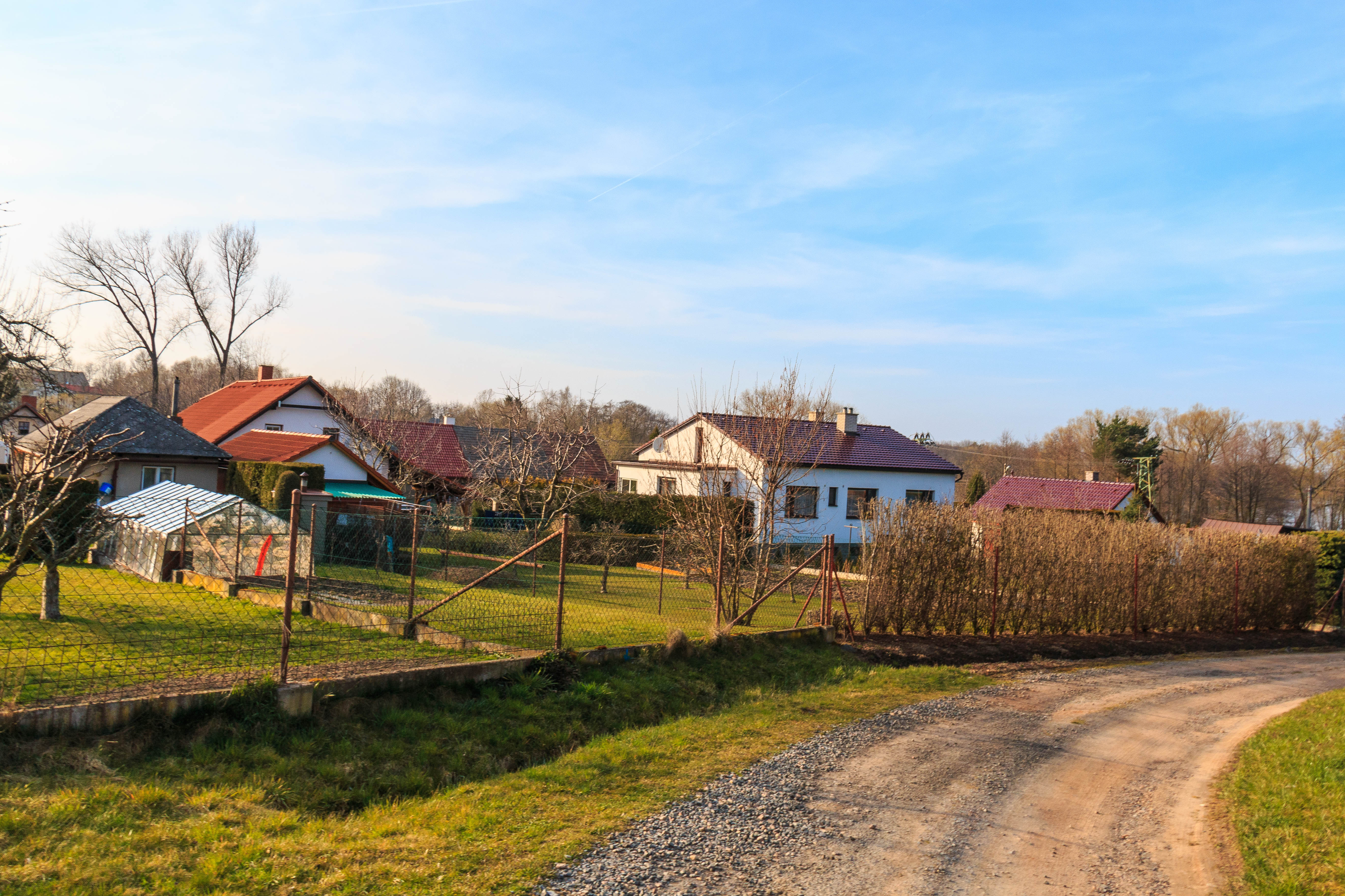 Dubová čp. 27